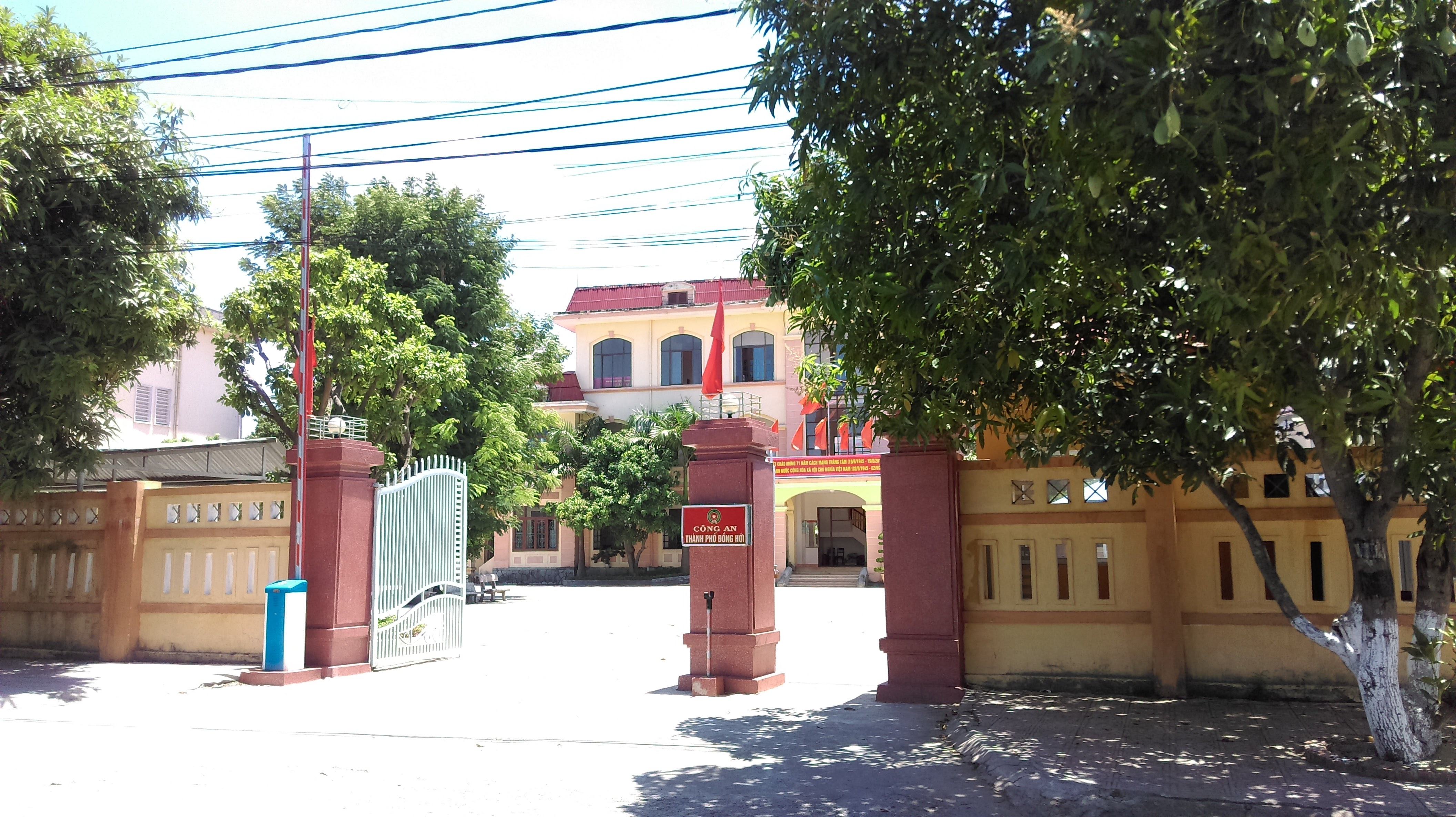 Công an Đồng Hới, Quảng Bình